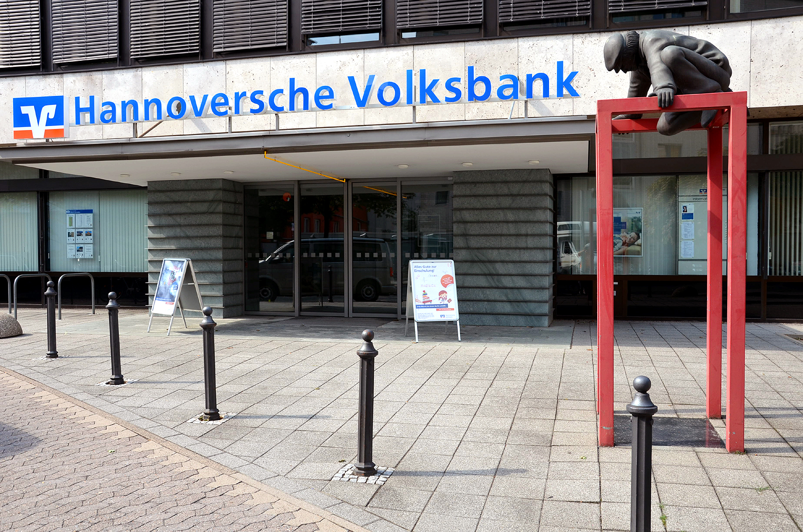 Die Figur des Lindener Butjers war eine von der damaligen Lindener Volksbank an die Bildhauerin Ulrike Enders und wurde 1990 vor der damaligen Zentrale der Bank (heute eine Zweigstelle der Hannoverschen Volksbank in der Minister-Stüve-Straße 22 aufgestellt. Da die Skulptur einen Lausbuben mit entsprechend geringer Körpergröße darstellen sollte, installierte die Künstlerin die Figur als kletternden Jungen erhöht auf einem Stahlgerüst ...